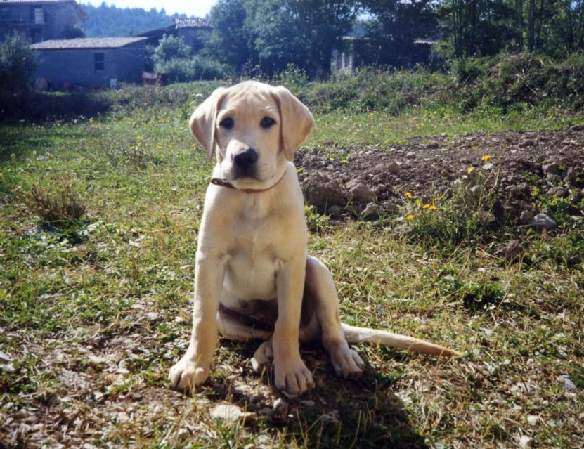 Photo d'un jeune labrador